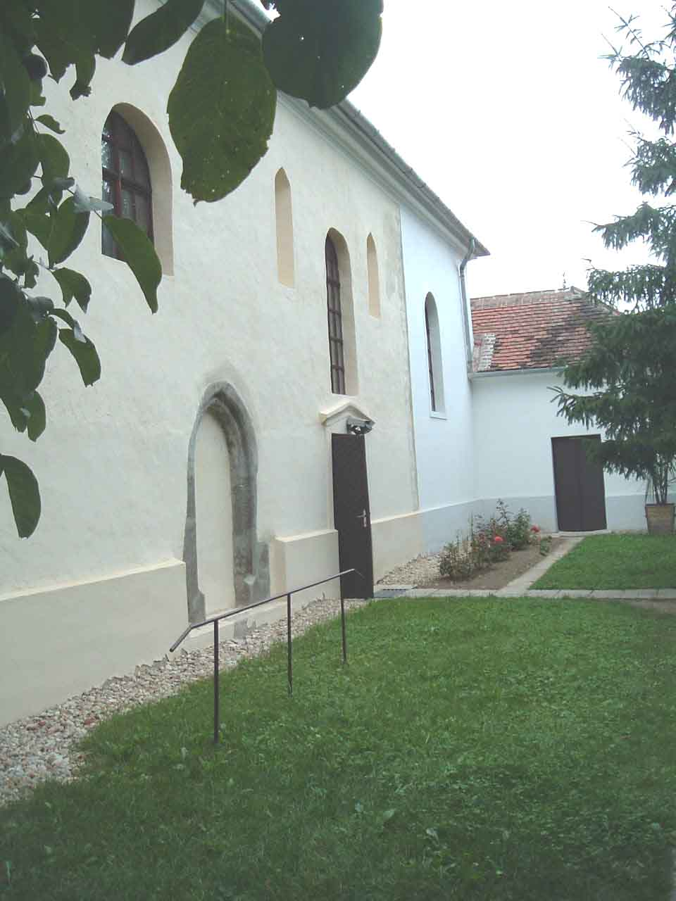 The Roman Catholic Church in Rum, Hungary. Szent László király római katolikus templom